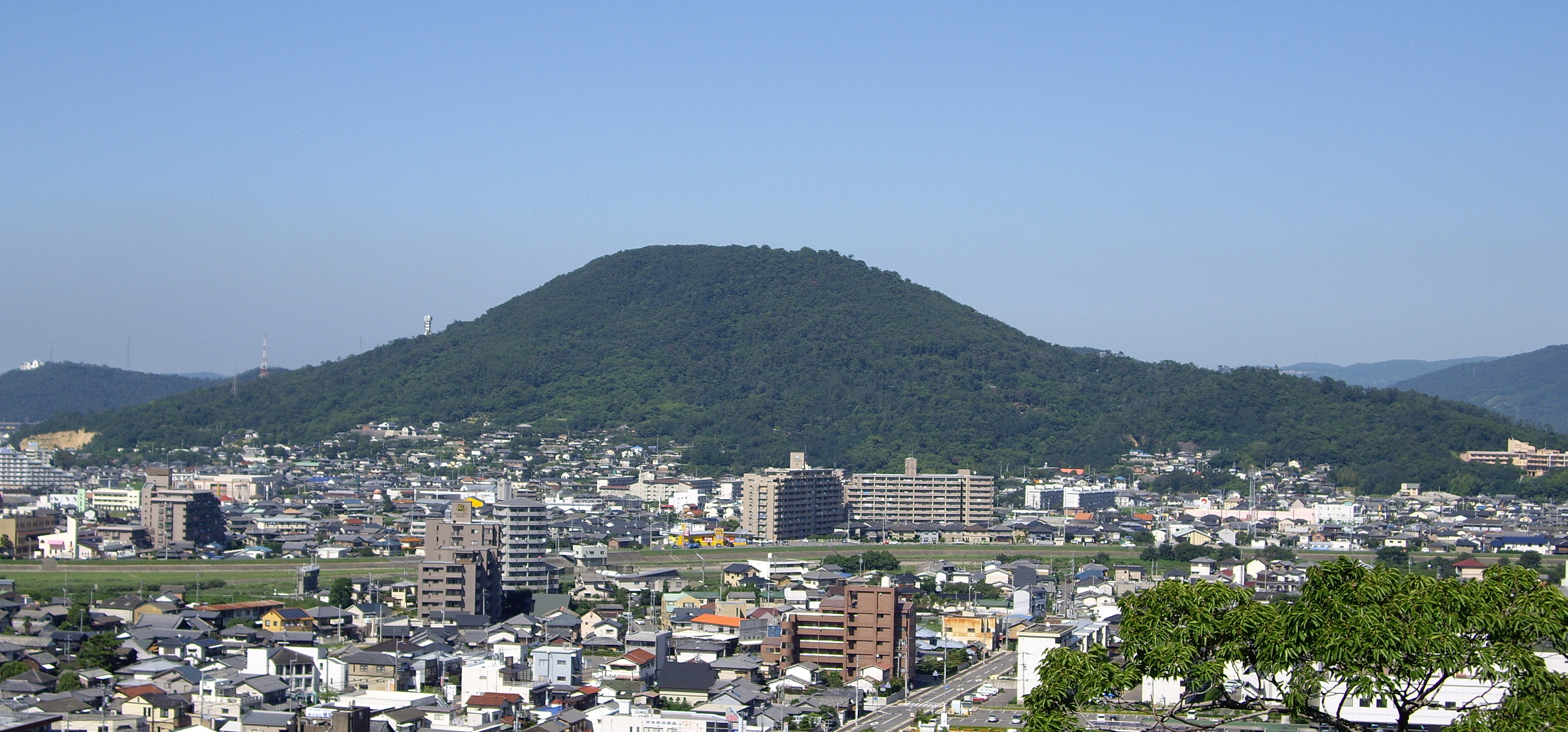 青ノ山（南西側：丸亀市の丸亀城より撮影） - 日本国香川県宇多津町